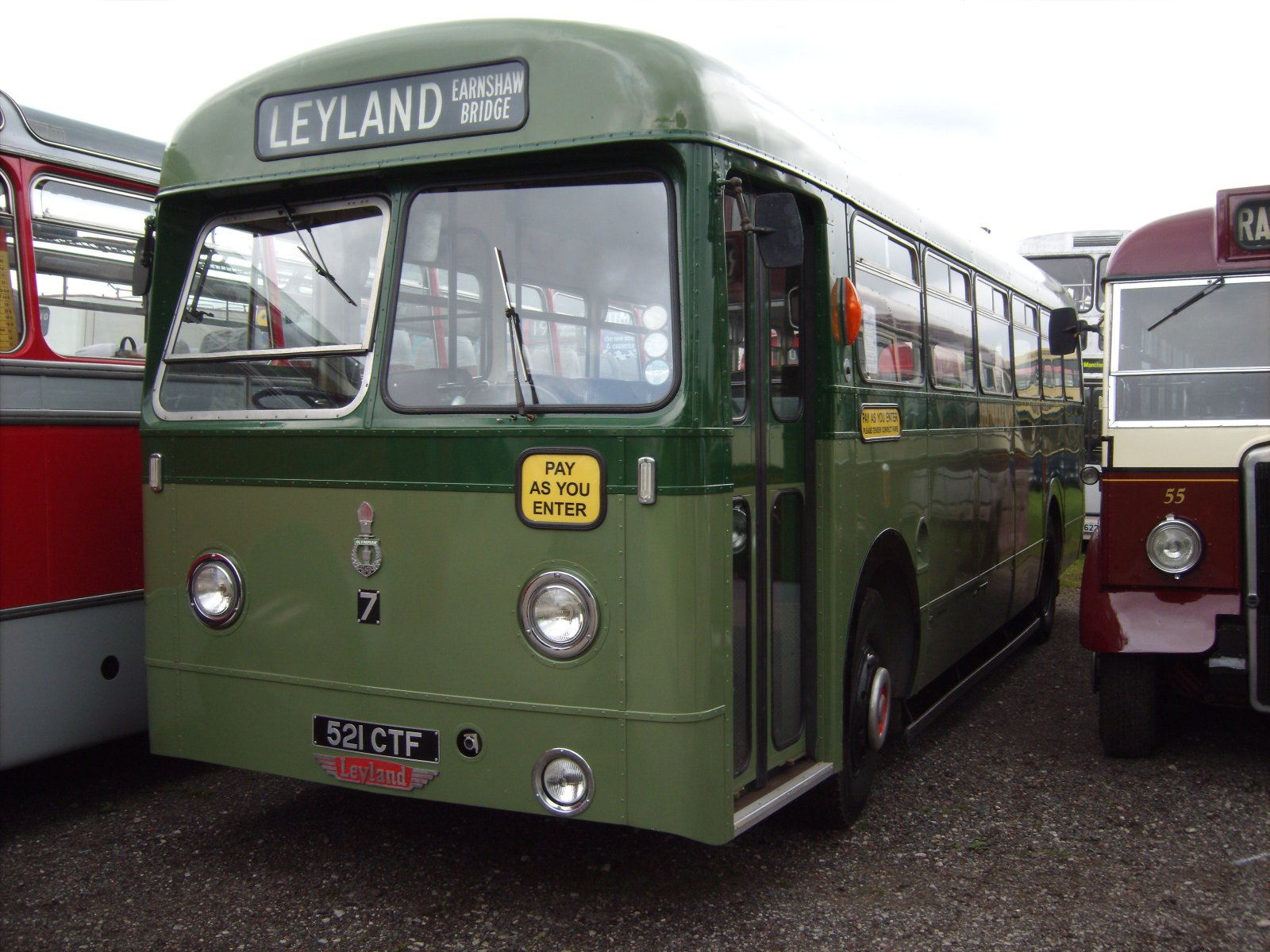 Ge digital camera